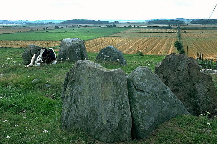 Dös. Bilden troligen från mitten av 1970-talet. Motiv: Klastorp Kategori: Stenkammargrav Dös. Bilden troligen från mitten av 1970-talet.